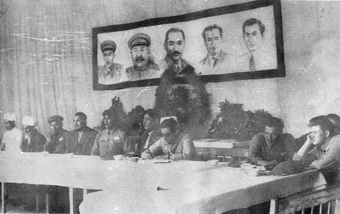 扎巴依喀勒山空难后，在新疆纪念五位烈士的场景。